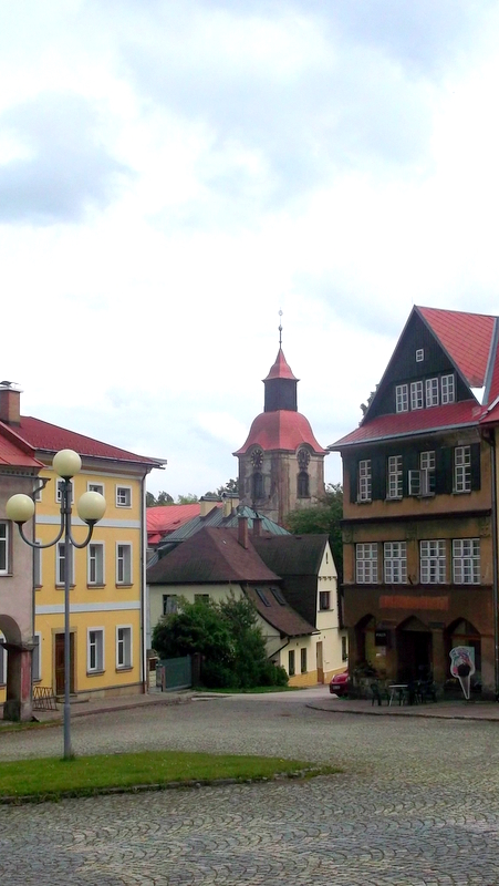 Kostel Nejsvětější Trojice (Žacléř), Žacléř